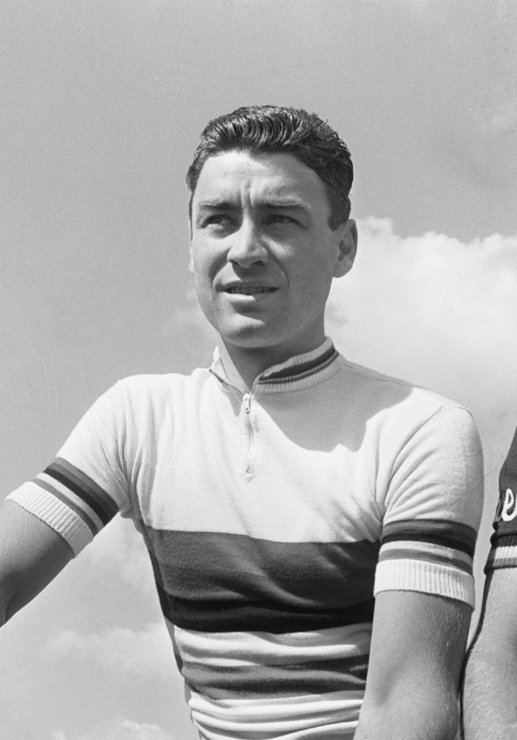 51ste Tour de France 1964, Benoni Beheyt